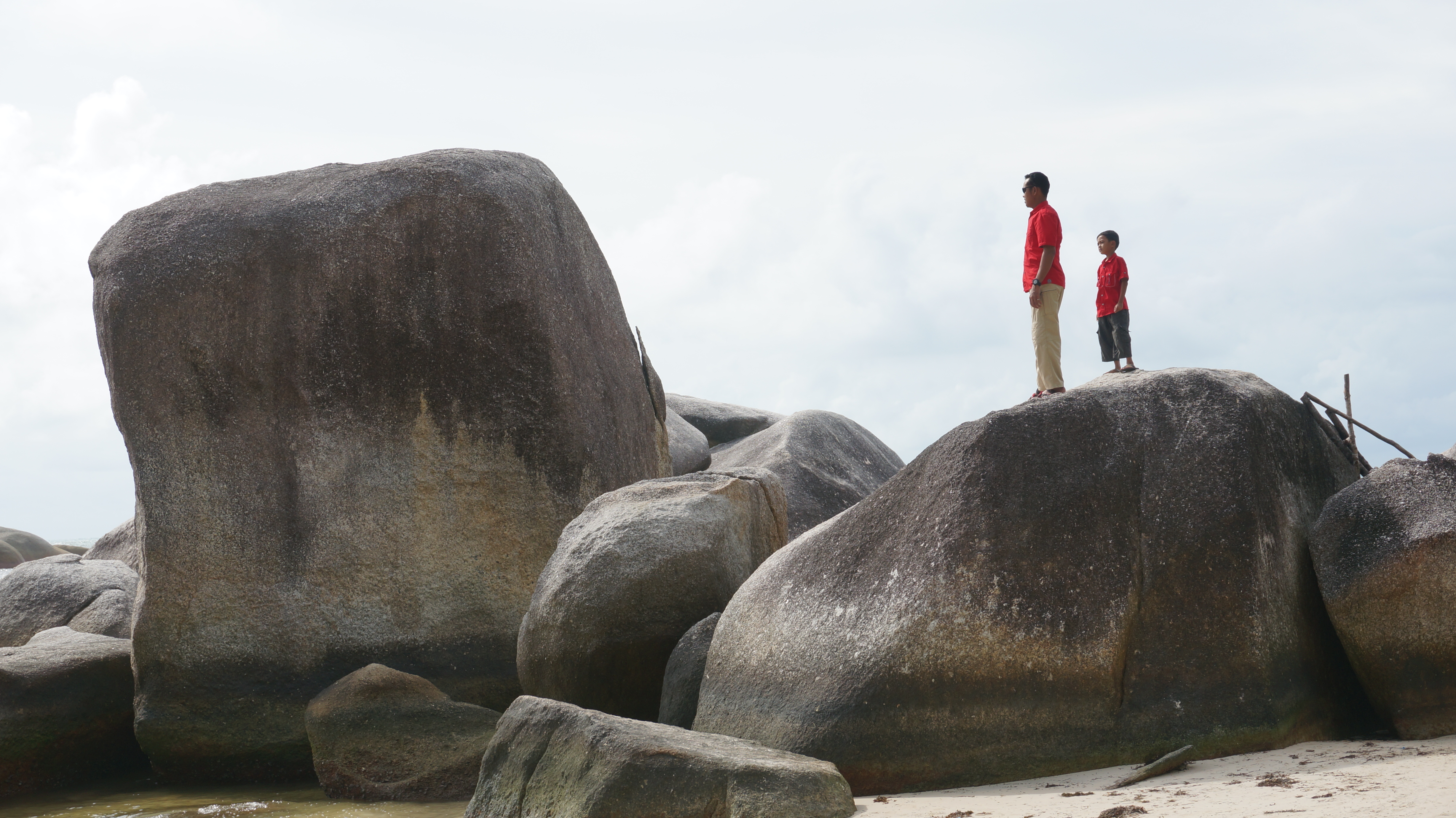 Lihat perbandingan ukuran batu di Pantai Tanjung Tinggi, Belitung dengan manusia dewasa dan anak-anak